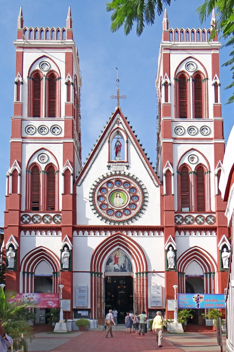 L'église du Sacré Cœur de Jésus L’Église du Sacré Cœur de Jésus, située dans le Boulevard Sud (ville tamoule), Subbayah Salai, est une église néo-gothique blanche et brune. Elle fut construite par les missionnaires français dans les années 1700. C’est l’une des plus belles églises catholiques de Pondichéry. Elle renferme de beaux vitraux et des tableaux décrivant les événements de la vie de Jésus Christ.